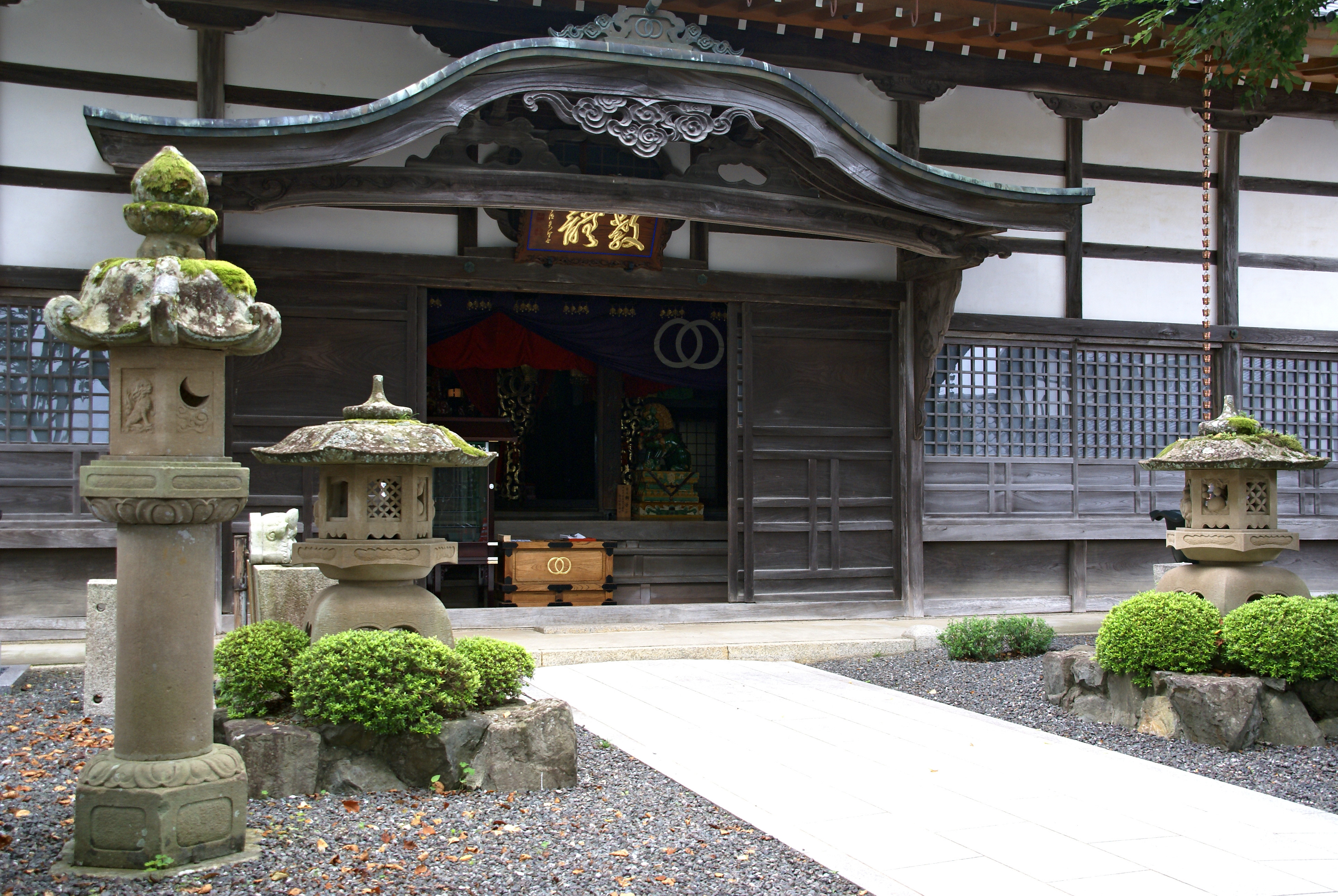 Keirinji in Maizuru, Kyoto prefecture, Japan